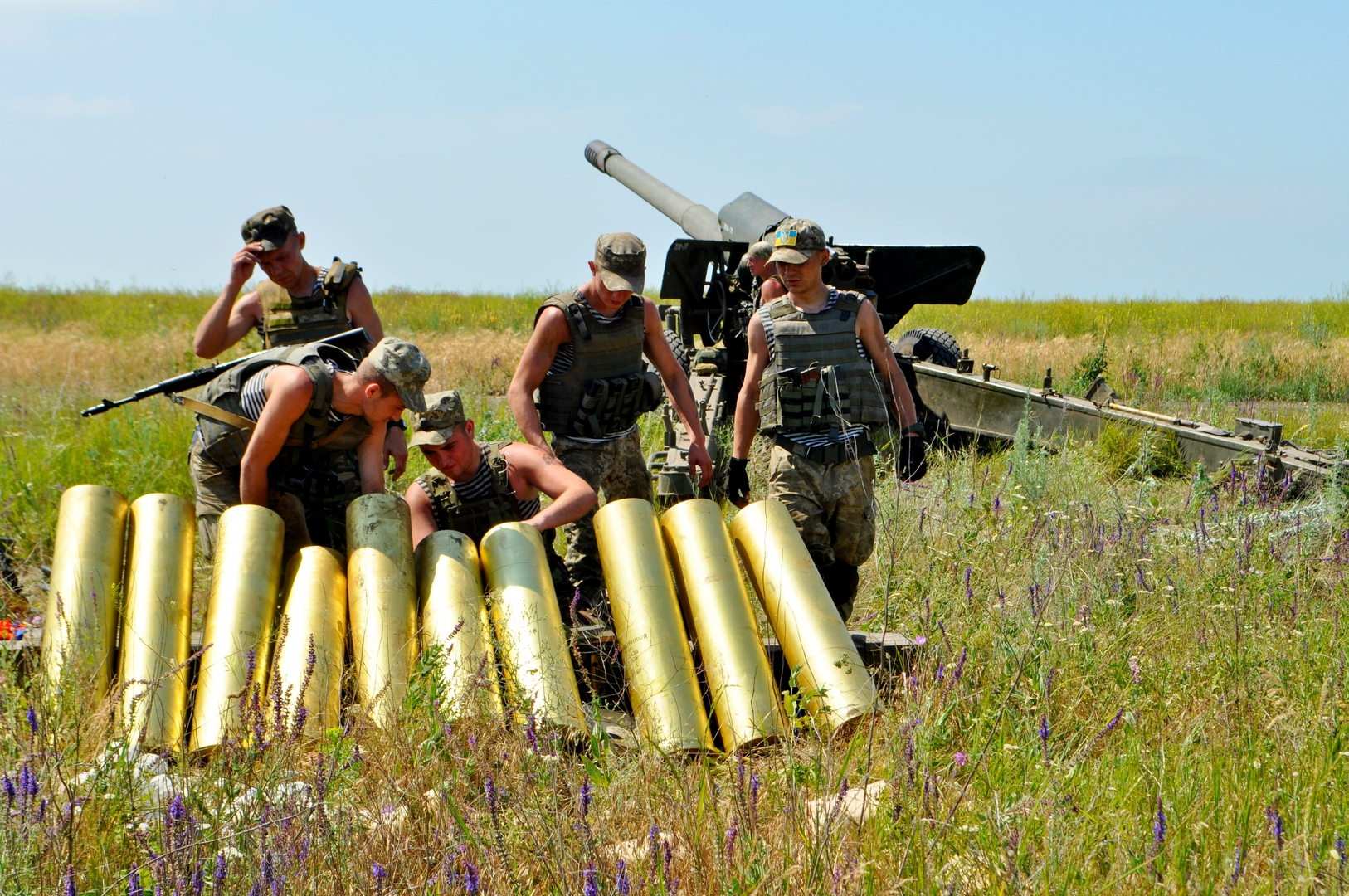 Гильзы от пушки Гиацинт.